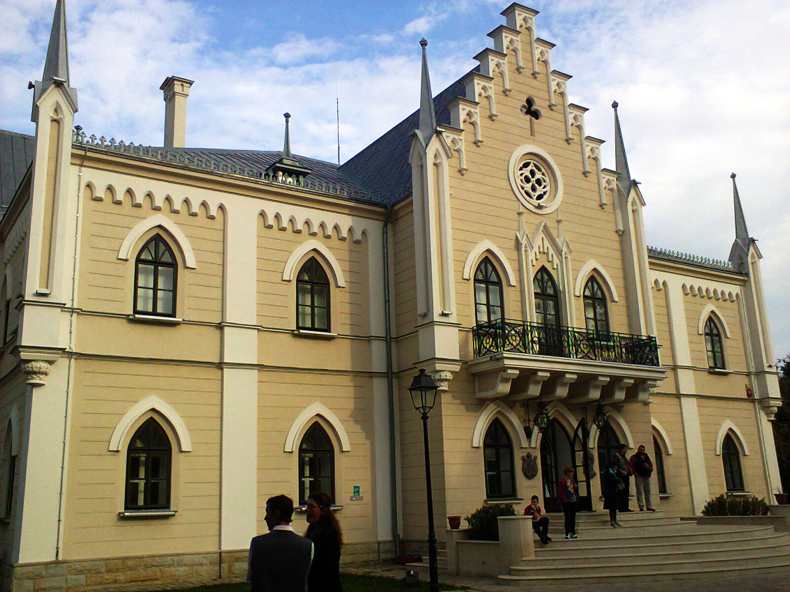 Palatul Alexandru Ioan Cuza 01